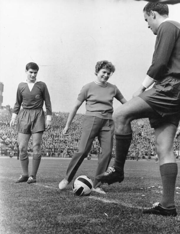 Zentralbild, 19.10.63, Begeisterung im Walter Ulbricht Stadion. Valja und Juri beim Fußballspiel DDR-Ungarn. Große Begeisterung herrschte am 19. Oktober 1963 im Berliner Walter-Ulbricht-Stadion, wo 70.000 Zuschauer die beiden sowjetischen Himmelsstürmer Valentina Tereschkowa und Juri Gagarin herzlich als Ehrengäste des Fußball-Länderspiels DDR-Ungarn begrüssten. An der Seite des ersten Sekretärs des ZK der SED und Vorsitzenden des Staatsrates, Walter Ulbricht, nahmen die beiden Kosmonauten auf der Ehrentribüne Platz. Besonderen Applaus "verdiente" sich Valentina, als sie den Ehrenanstoss dieser bedeutsamen Europapokal-Begegnung vollzog. UBz: Mit sichtlichem Vergnügen vollzieht Valentina den Ehrenanstoss und flankt den Ball auf den DDR-Stürmer Jürgen Nöldner (rechts). Links: DDR-Mittelstürmer Peter Ducke.